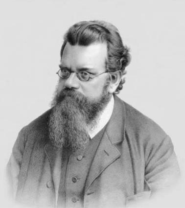 Ludwig Eduard Boltzmann (* 20. Februar 1844 in Wien; † 5. September 1906 in Duino bei Triest)